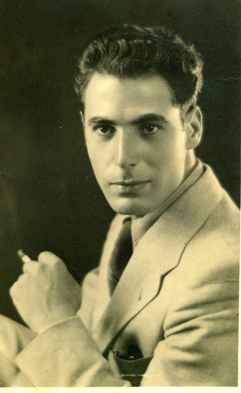 Antonio Belviso (portrait)